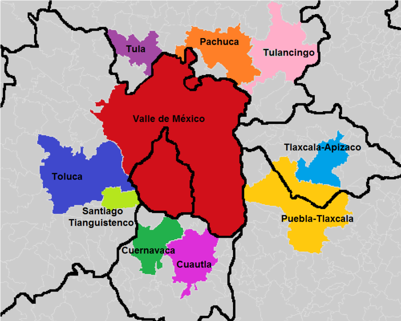 Ubicación de las metrópolis que conforman la Megápolis de México.